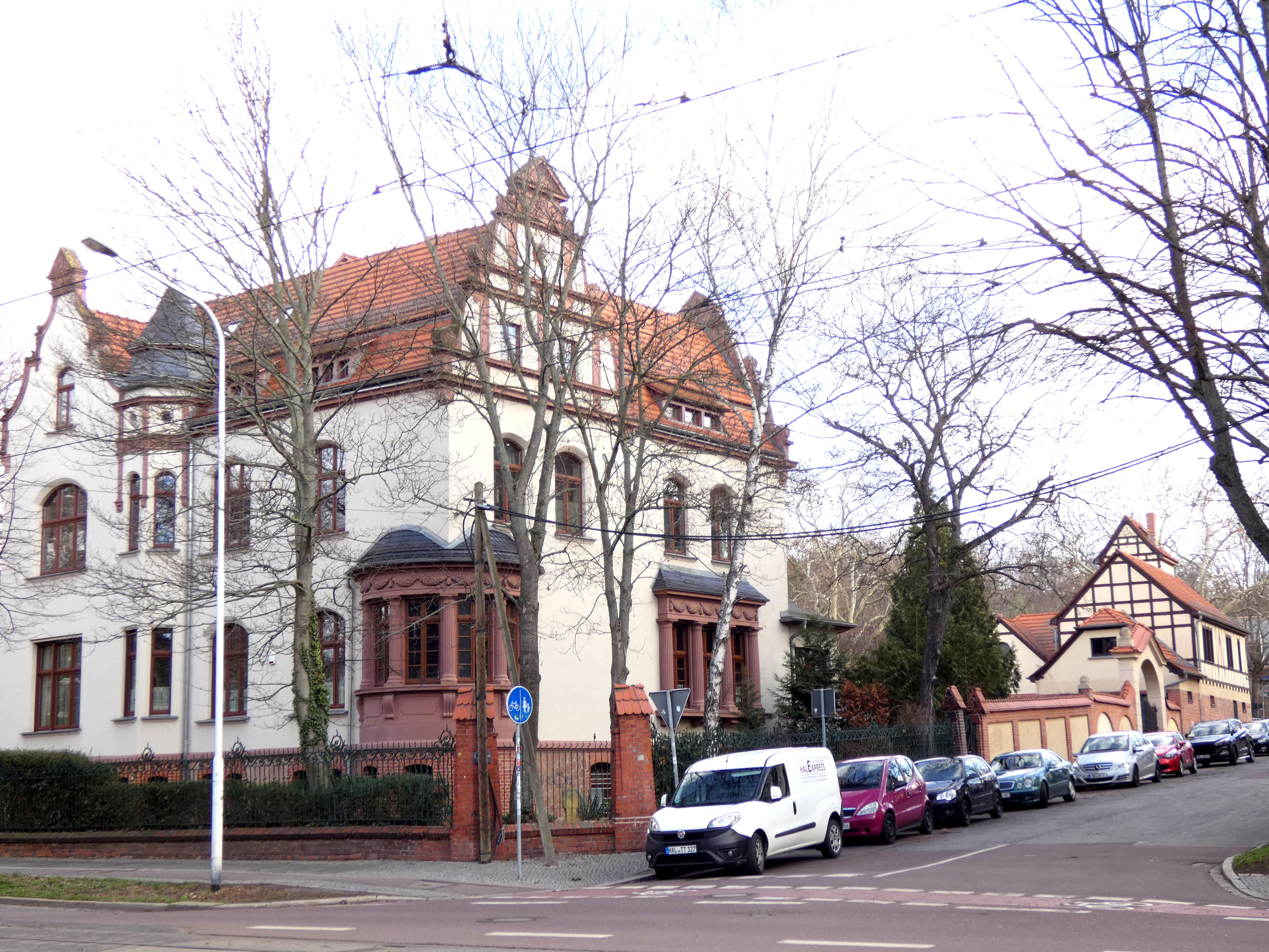 Villa Reilstraße 97 an der Ecke Fleischmannstraße mit Blick auf die Remise Erlach-von-Fischer-Straße 79, Halle (Saale)